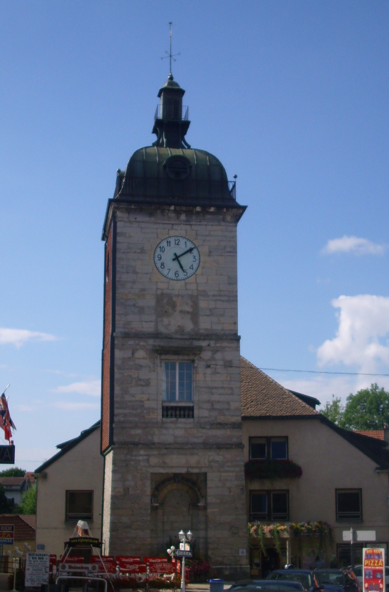 Une des deux eglises de Champagnole (39)